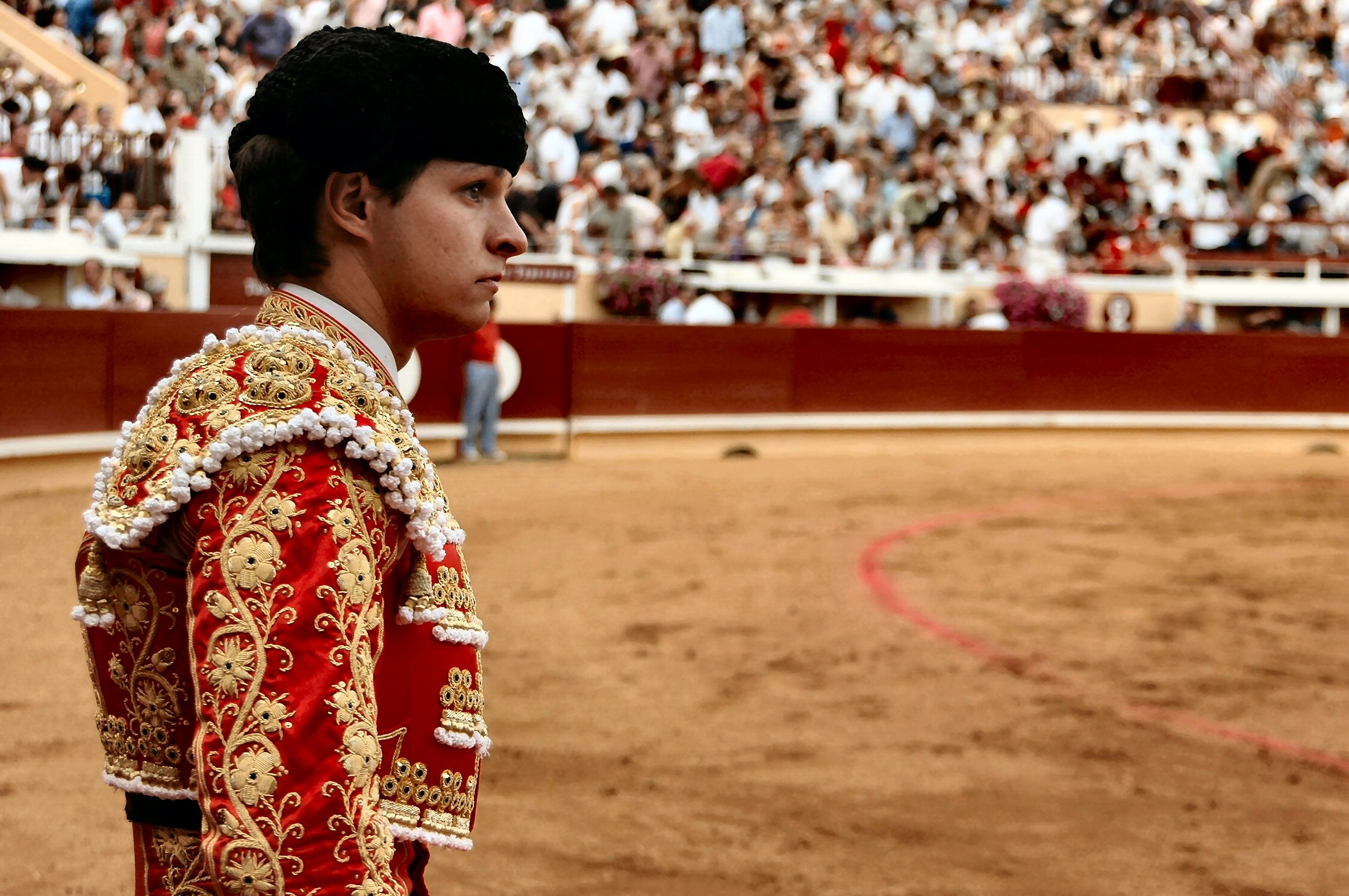 El Juli, Concentration, Bayonne 5 Septembre 2004